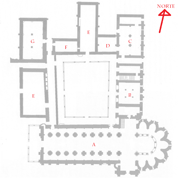 El Monasterio de Santa María de Moreruela compuesto por los siguientes espacios: A - Iglesia B - Sala Capitular C - Sala de Monjes D - Calefactorio? E - Refectorio F - cocina G - Refectorio de Conversos E - Cilla